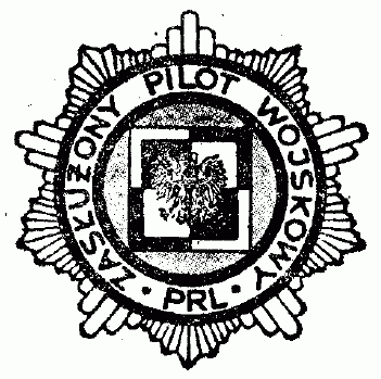 Odznaka tytułu honorowego "Zasłużony Pilot Wojskowy Polskiej Rzeczypospolitej Ludowej" – 1978-1992.